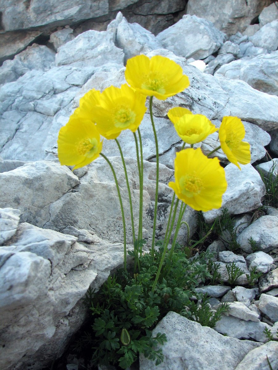 petkovškov mak na Tičarici - Zelnarica.